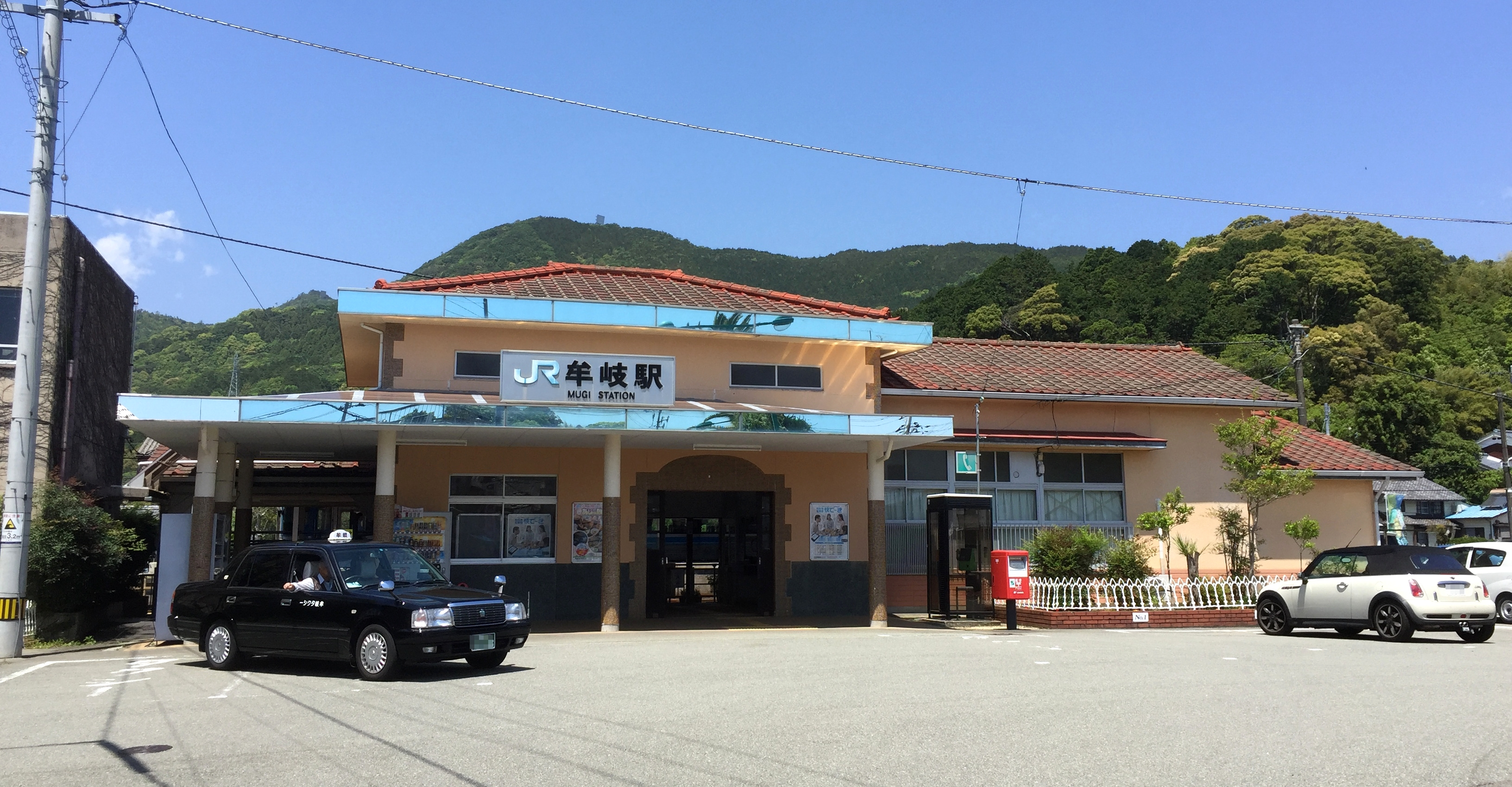 牟岐駅駅舎